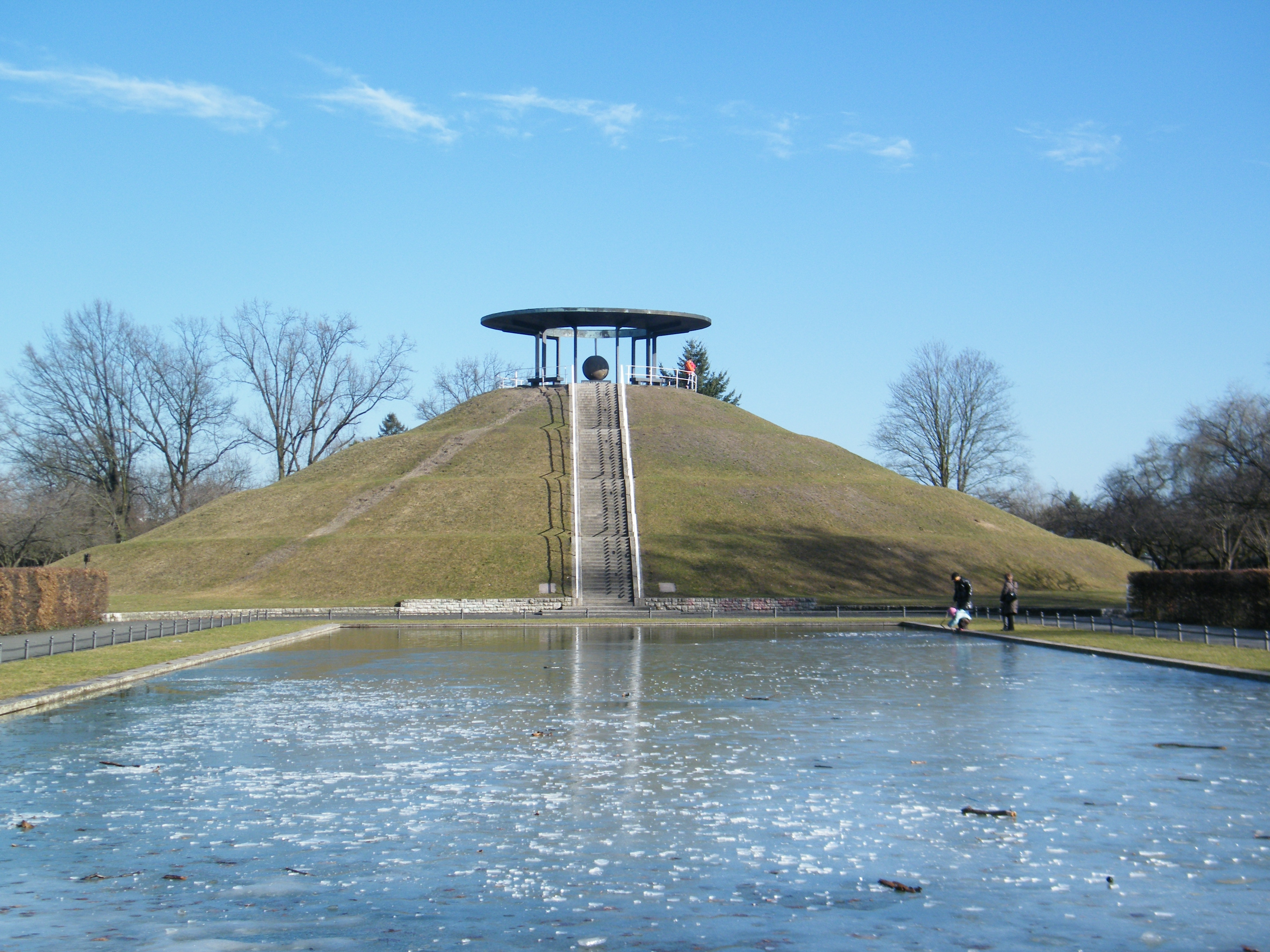 Blick auf den Fliegeberg über den Karpfenteich Unknown